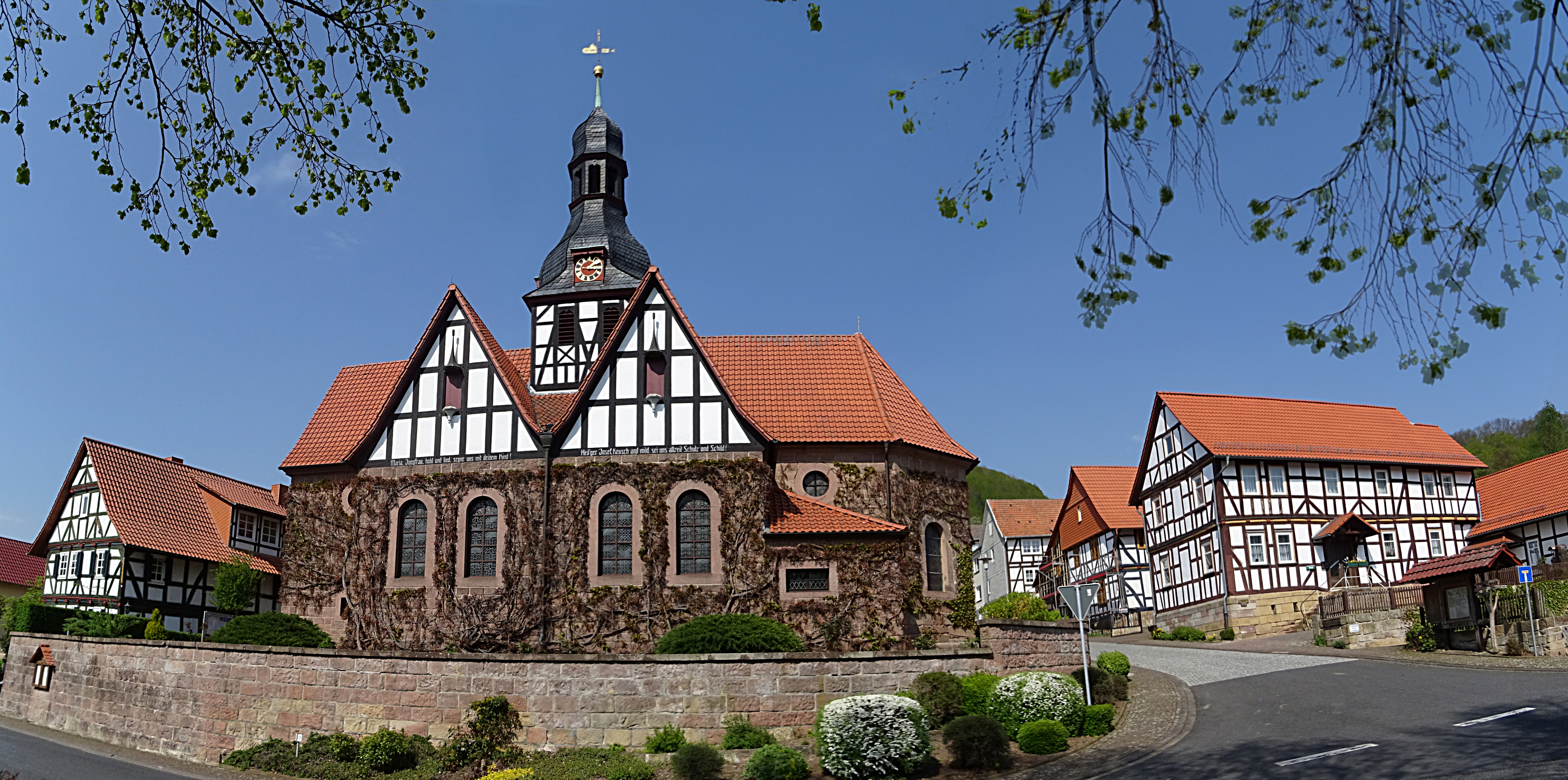 Dorfkirche St. Martin und Pfarrhaus in Mackenrode von Süden